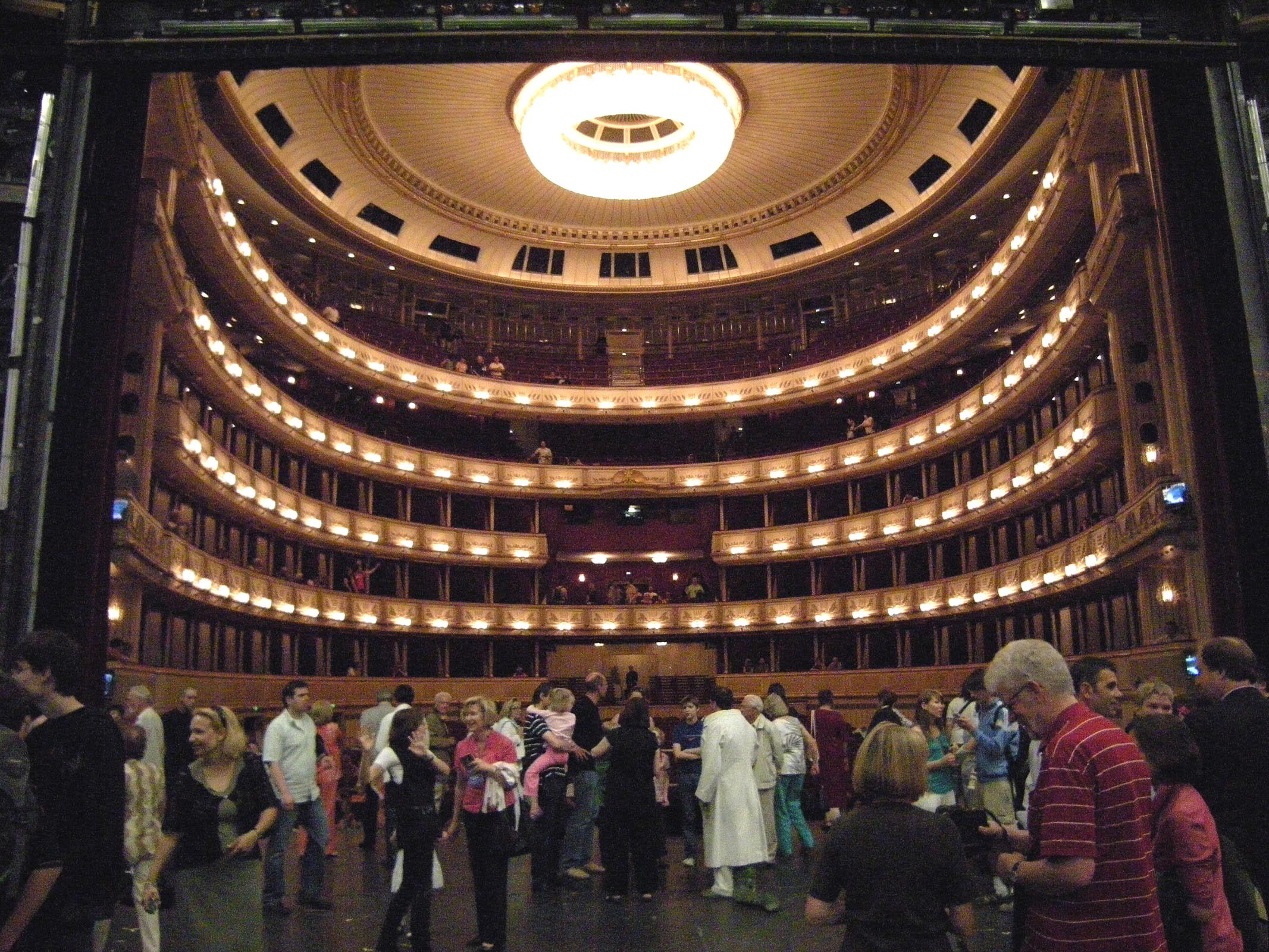 Staatsoper 'Open House' - auditory view from stage b